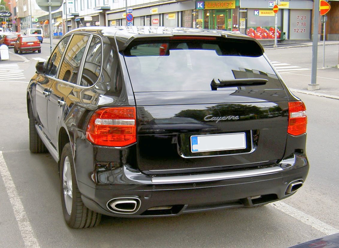 Porsche Cayenne